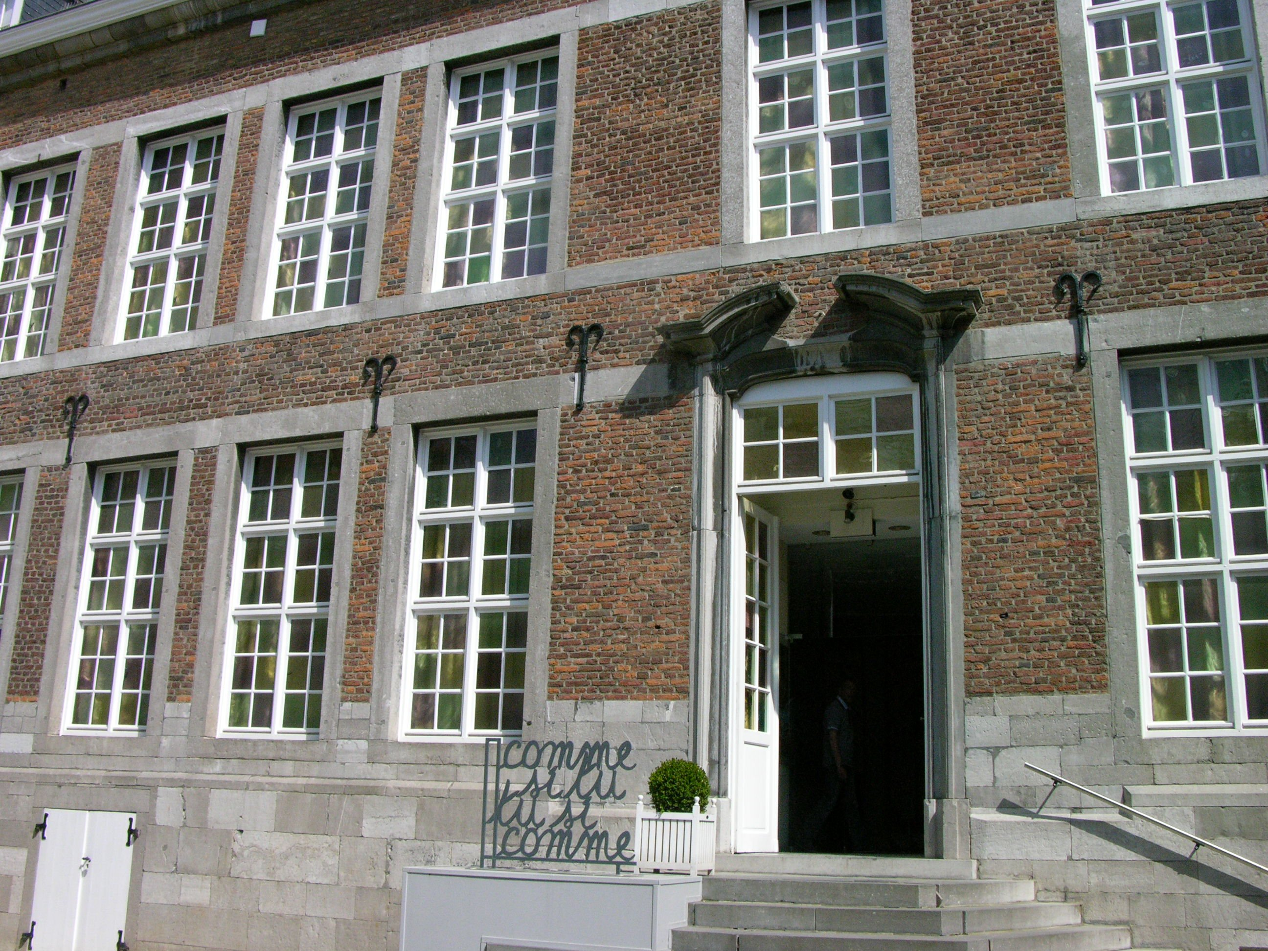 Façade intérieure de l'ancien Hôtel Gaiffier d'Hestroy (XVIIIe siècle). Rue de Fer (Namur). Aujourd'hui Musée des Arts anciens du Namurois.